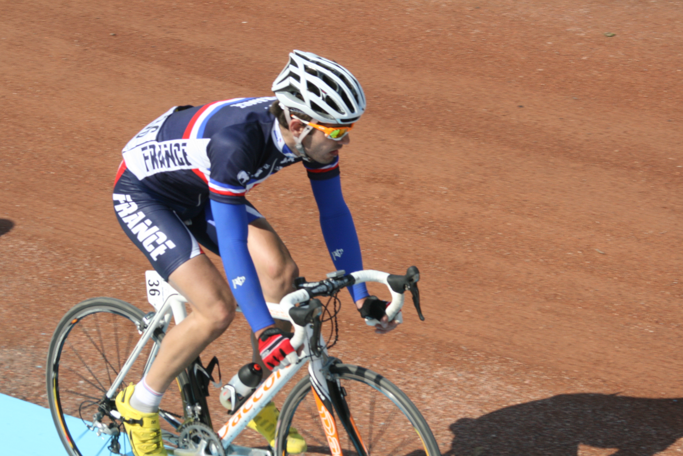 Emilien Viennet à l'arrivée du Paris-Roubaix juniors 2010